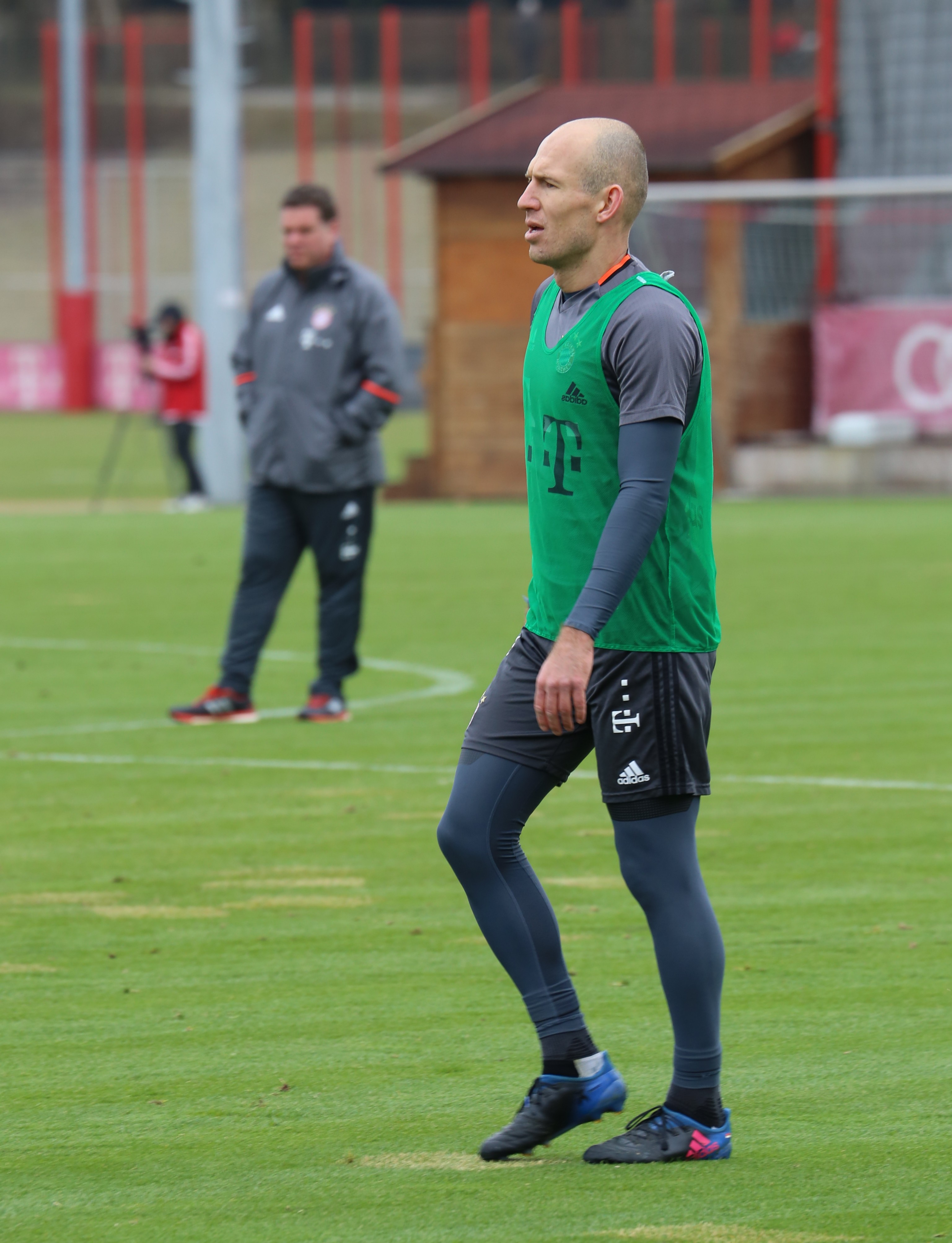 Arjen Robben, am 14. März 2017 beim Training auf dem Gelände des FC Bayern München